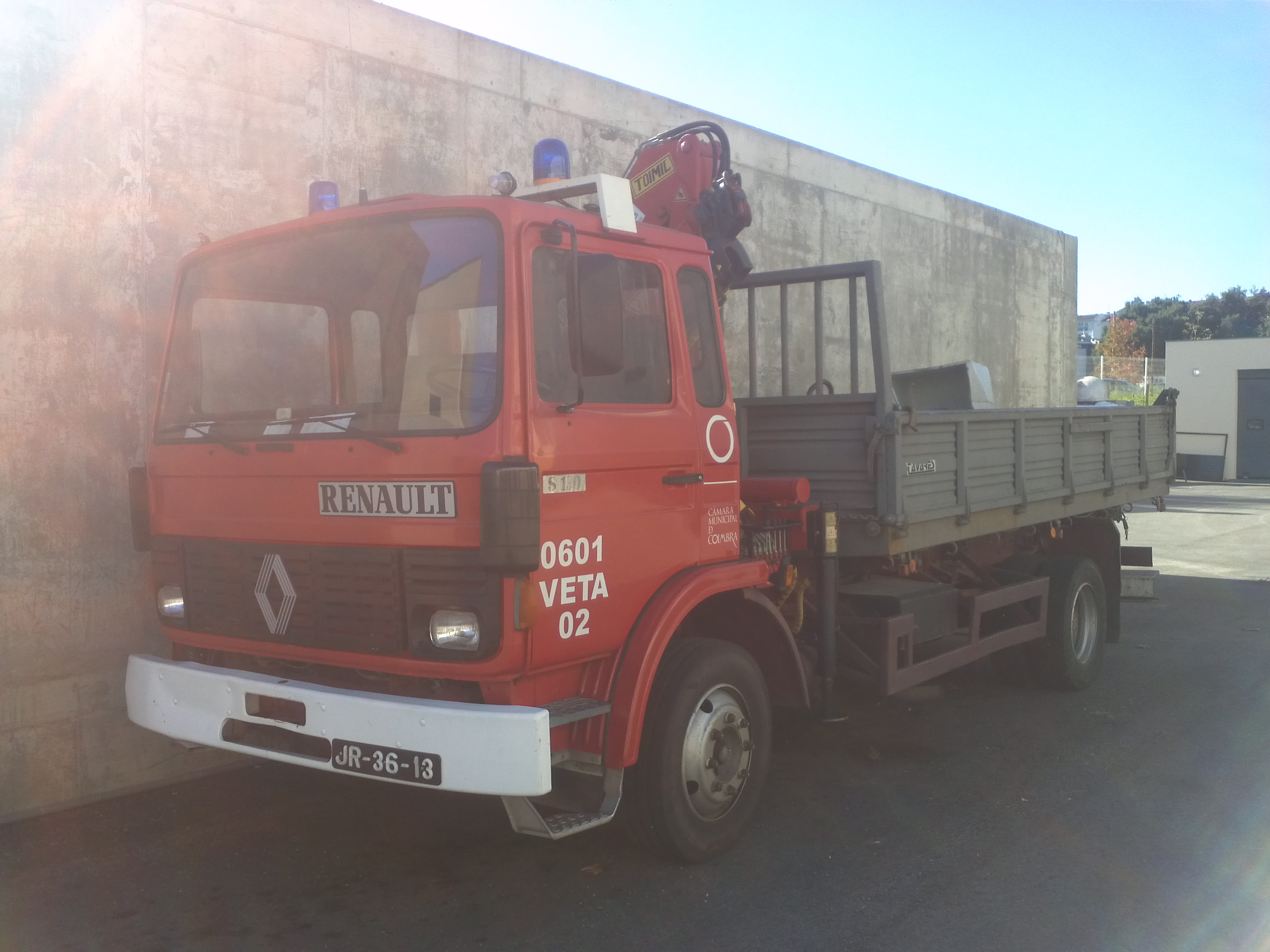 Veículo com Equipamento Técnico de Apoio 02